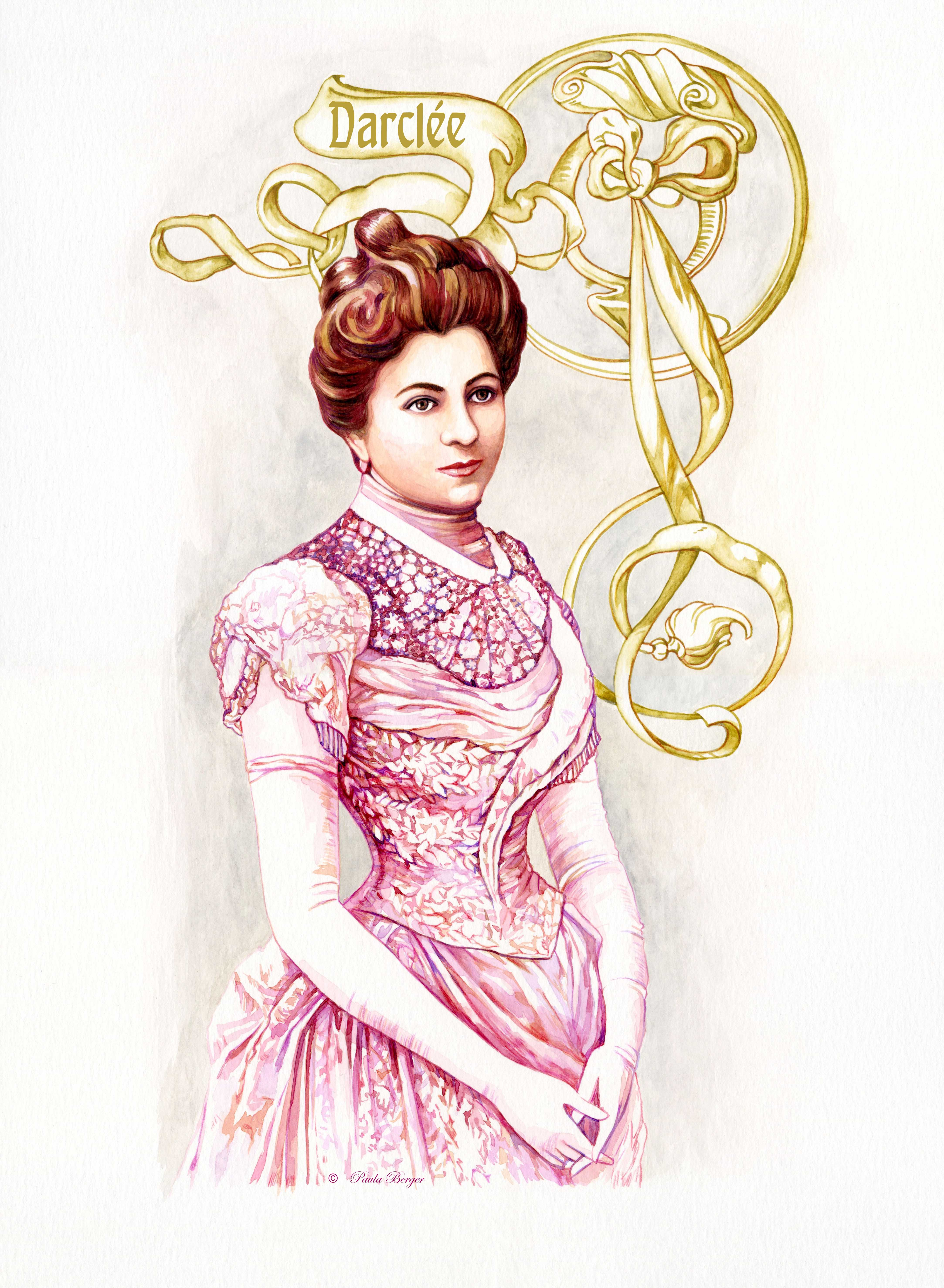 Illustration Paula Berger